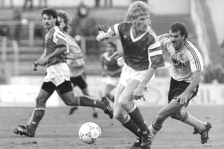 5.9.90 Halle: Oberliga- HFC Chemie - 1. FC Dynamo Dresden 3:1- (1:1) Dirk Wüllbier (M.-Halle) trug sich in der 33. Spielminute als erster in die Torschützenliste ein und brachte seine Mannschaft in Führung. Rechts: Sergio Allievi (Dresden). Links: Karsten Neitzel (Halle). ADN-Wolfgang Kluge